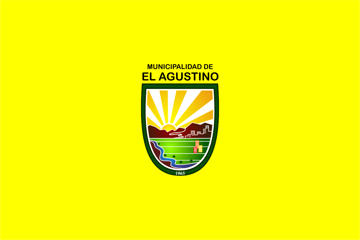 Distrito del Agustino - Provincia de Lima - Región Lima